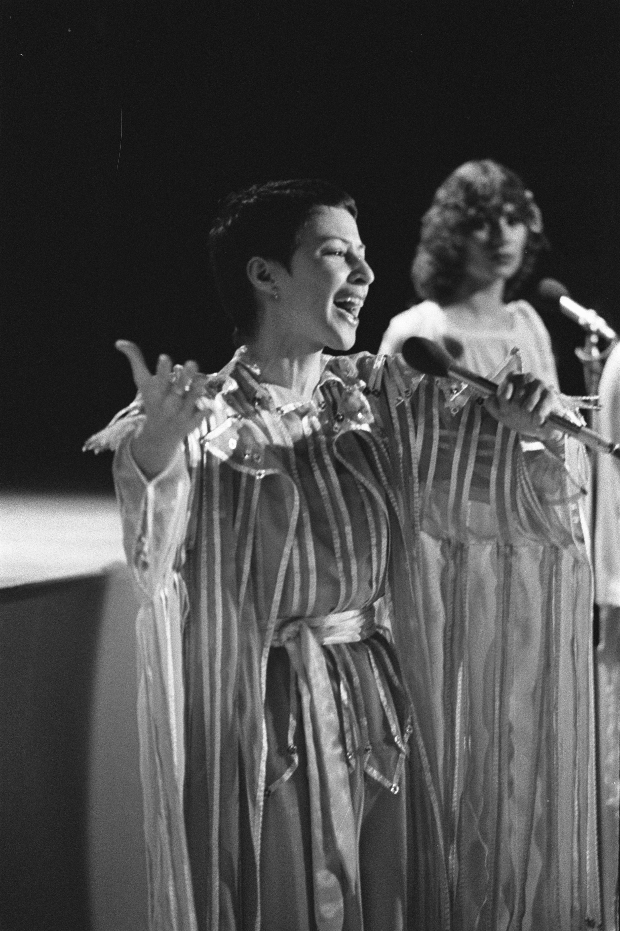 Collectie / Archief : Fotocollectie Anefo Reportage / Serie : [ onbekend ] Beschrijving : Songfestival; Heddy Lester tijdens optreden Datum : 2 februari 1977 Trefwoorden : Songfestivals Fotograaf : Suyk, Koen / Anefo Auteursrechthebbende : Nationaal Archief Materiaalsoort : Negatief (zwart/wit) Nummer archiefinventaris : bekijk toegang 2.24.01.05 Bestanddeelnummer : 929-0090